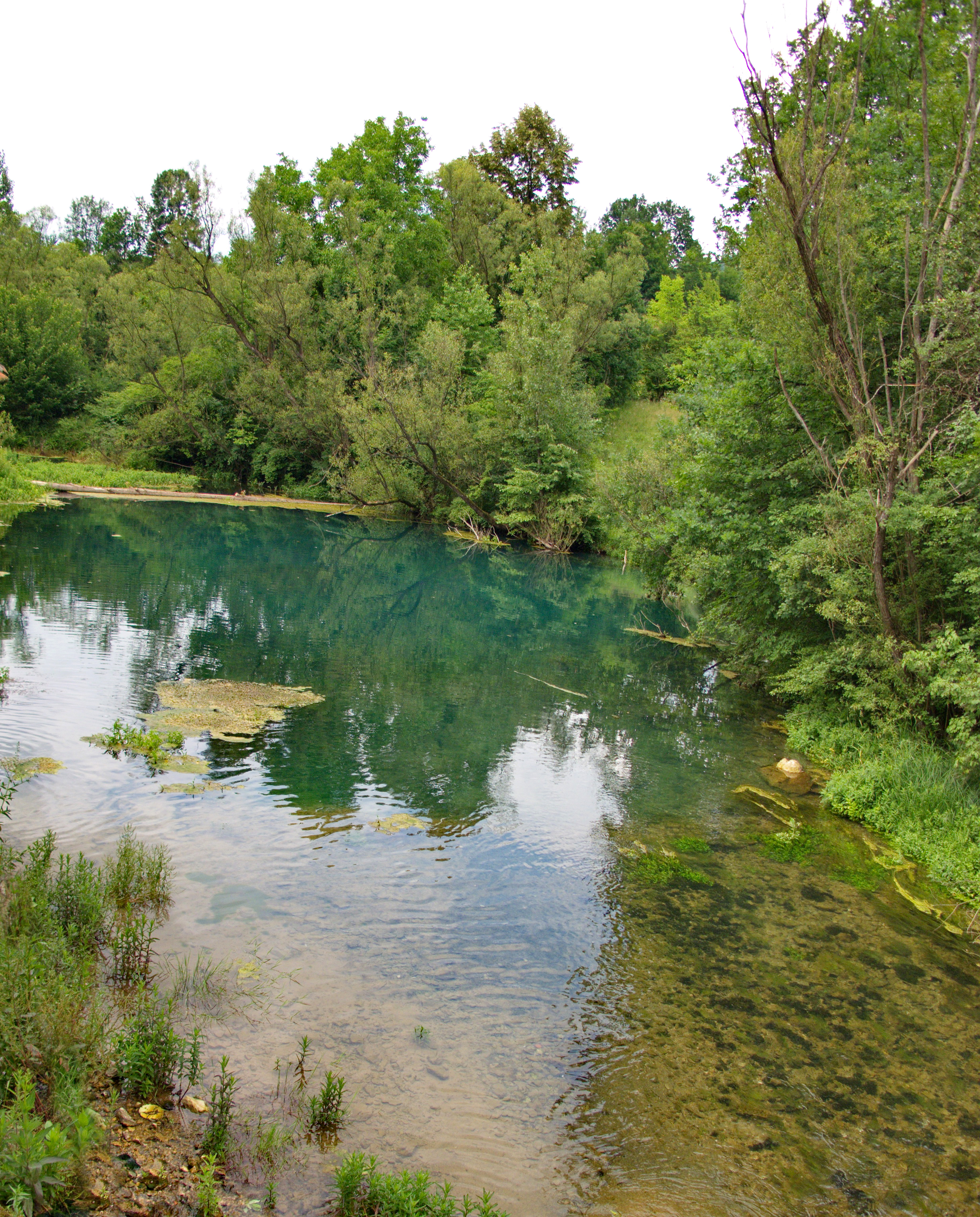 Споменик природе Крупајско врело